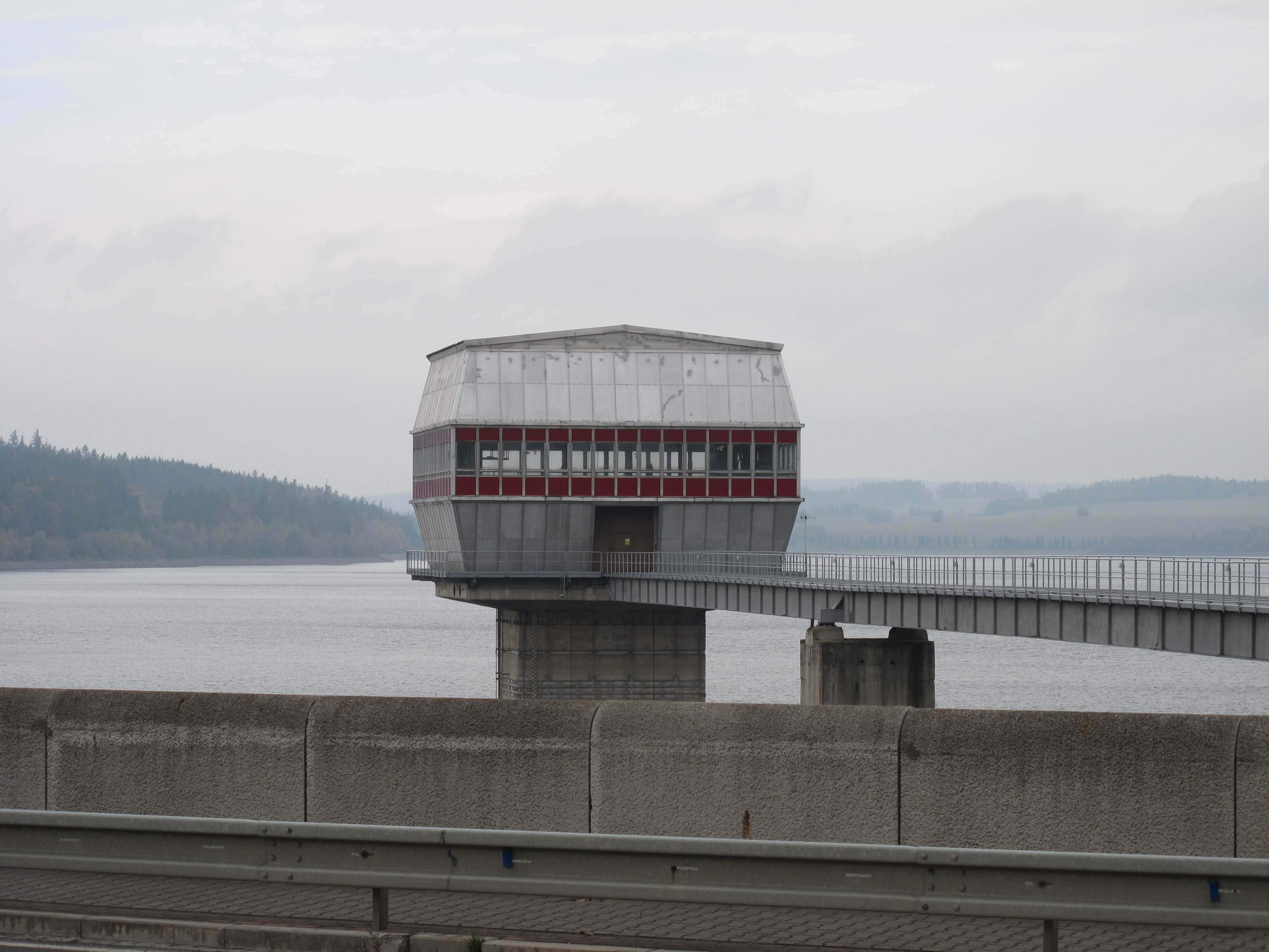 Vodní nádrž Slezská Harta. Okres Bruntál, Česká republika.